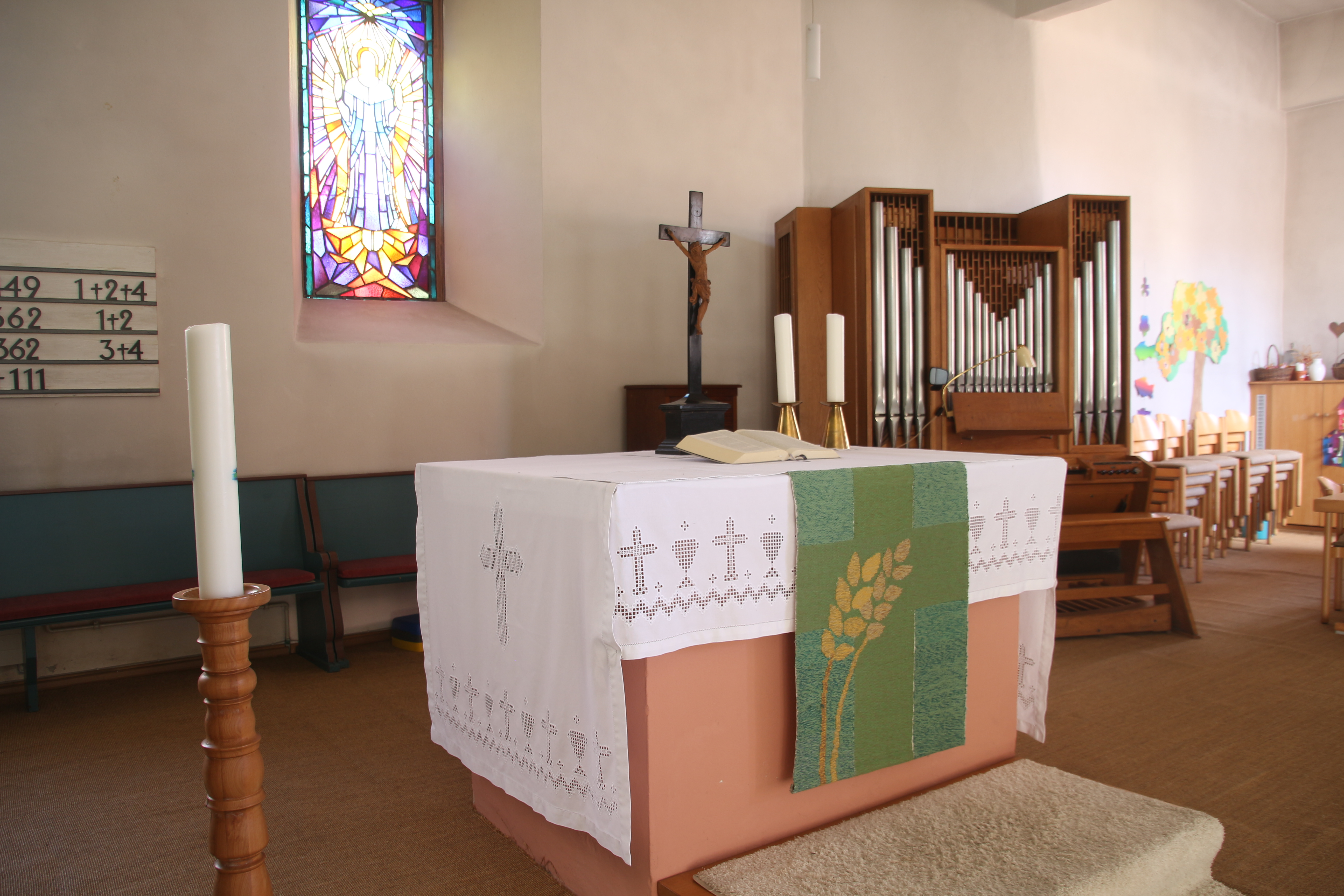 Evangelische Kirche Fauerbach, Gemeinde Nidda, Wetteraukreis, Hessen